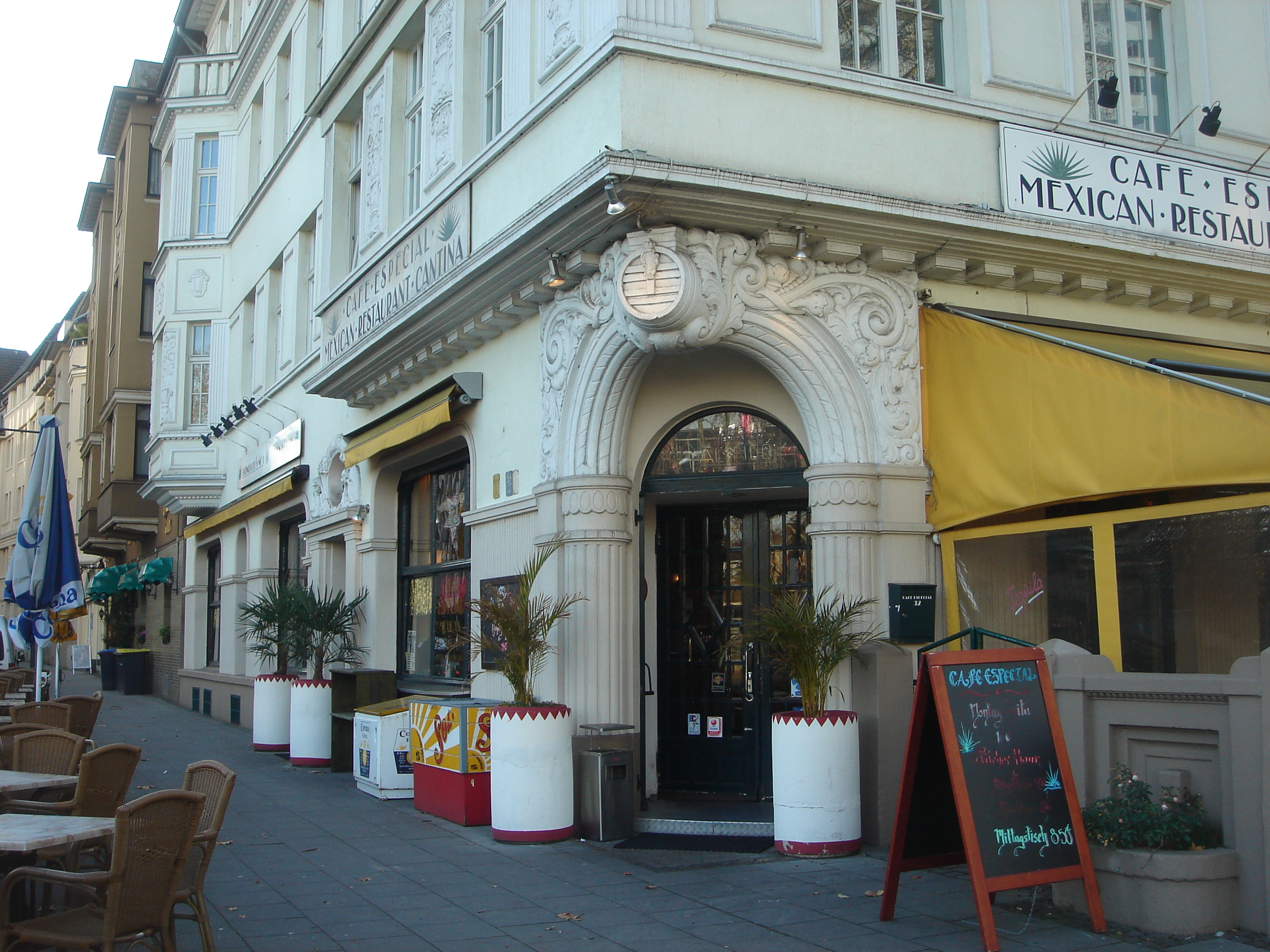 Restaurant ehemaliger Name Heidelberger Fass